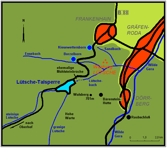 Lütsche-Wüstung mit Umgebung